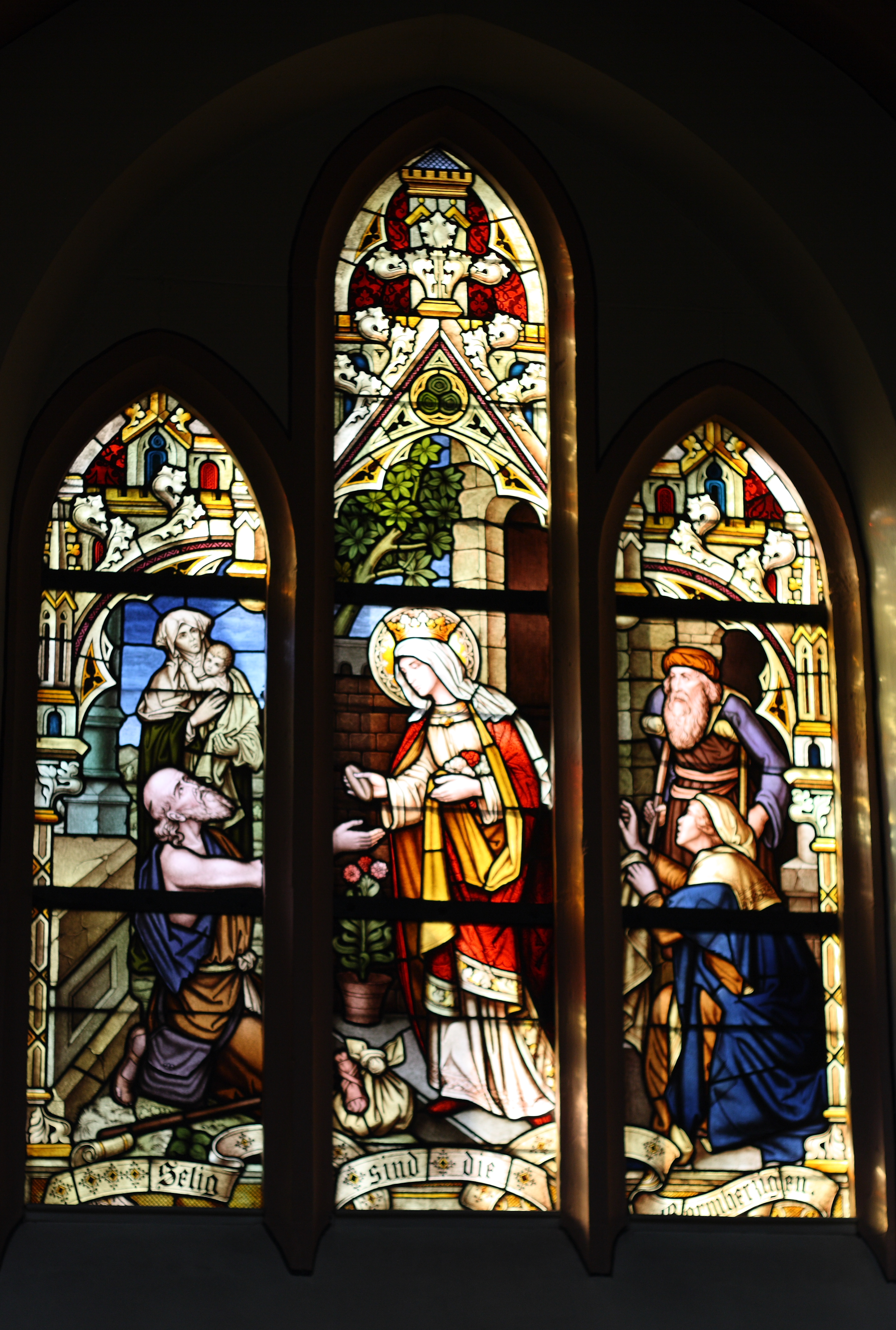 katholische Pfarrkirche St. Johannes der Täufer in Burgbrohl, Darstellung: hl. Elisabeth von Thüringen, Hersteller: Glasmalerei Oidtmann, 1907 (siehe LI-PEN YU: Die Glasmalerei in Trier 1860-1930. Trier 2007, S. 501)